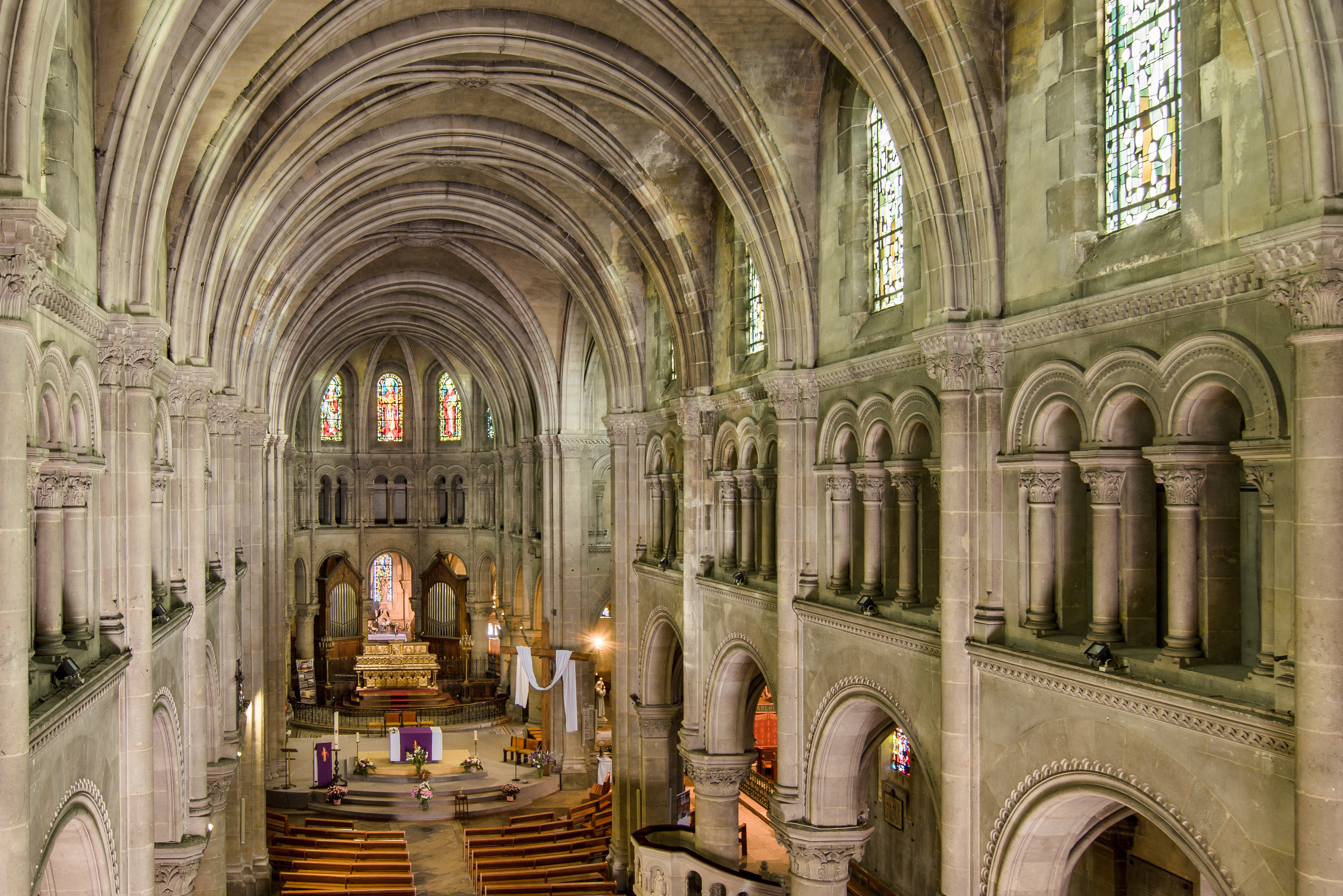 Nef de la basilique d'Argenteuil vue de la tribune